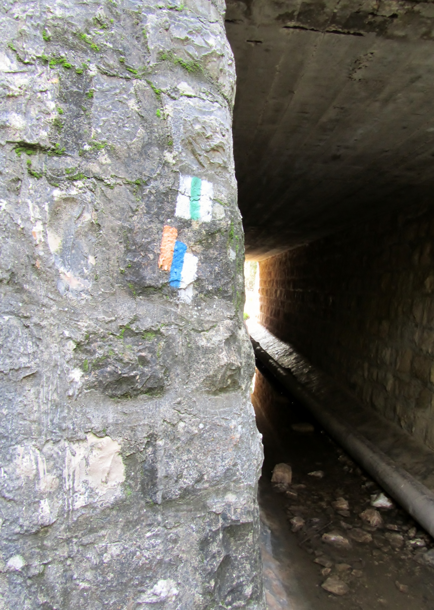 סימון שביל ישראל ושביל ירוק